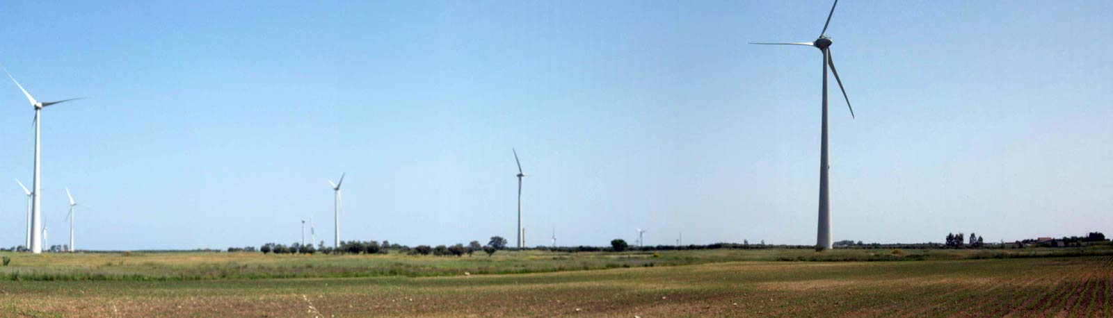 Campo Eolico